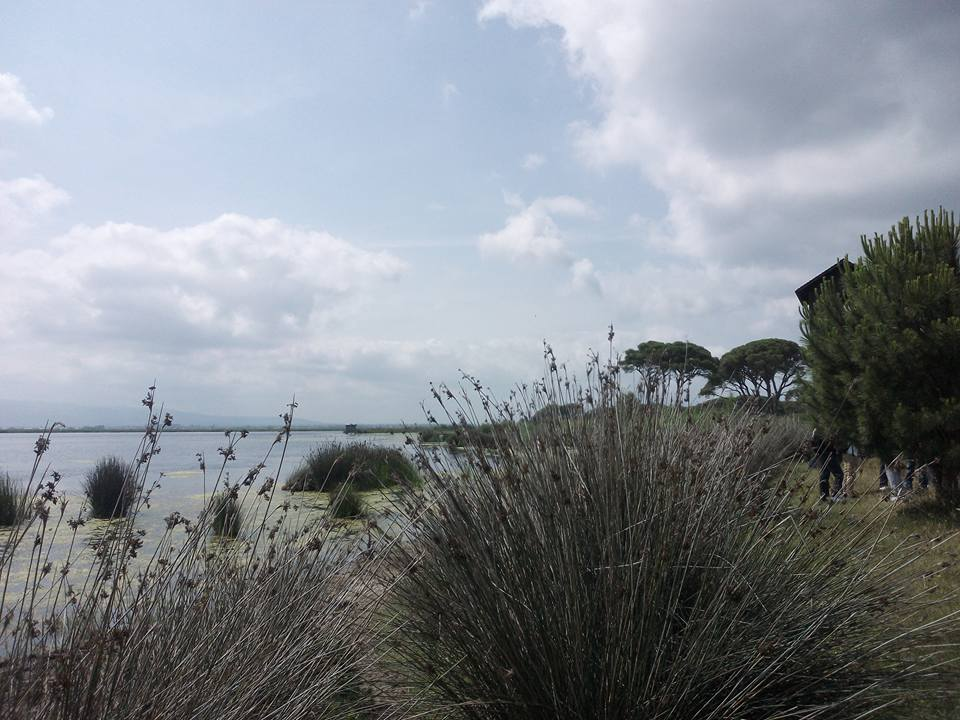 Strofilia Kotixi This is a photography of Natura 2000 protected area with ID GR2320001